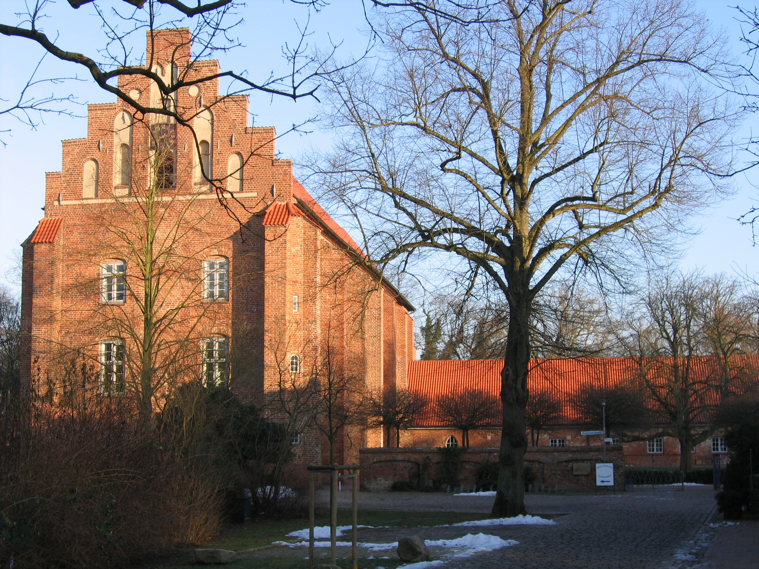 Cismar Kloster im Januar 2006